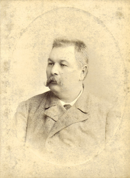 Кропивницький Марко Лукич, 90-ті роки ХІХст. Джерело надходження не вказане. Фонди Кіровоградського обласного краєзнавчого музею